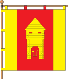 Прапор міста Путивль